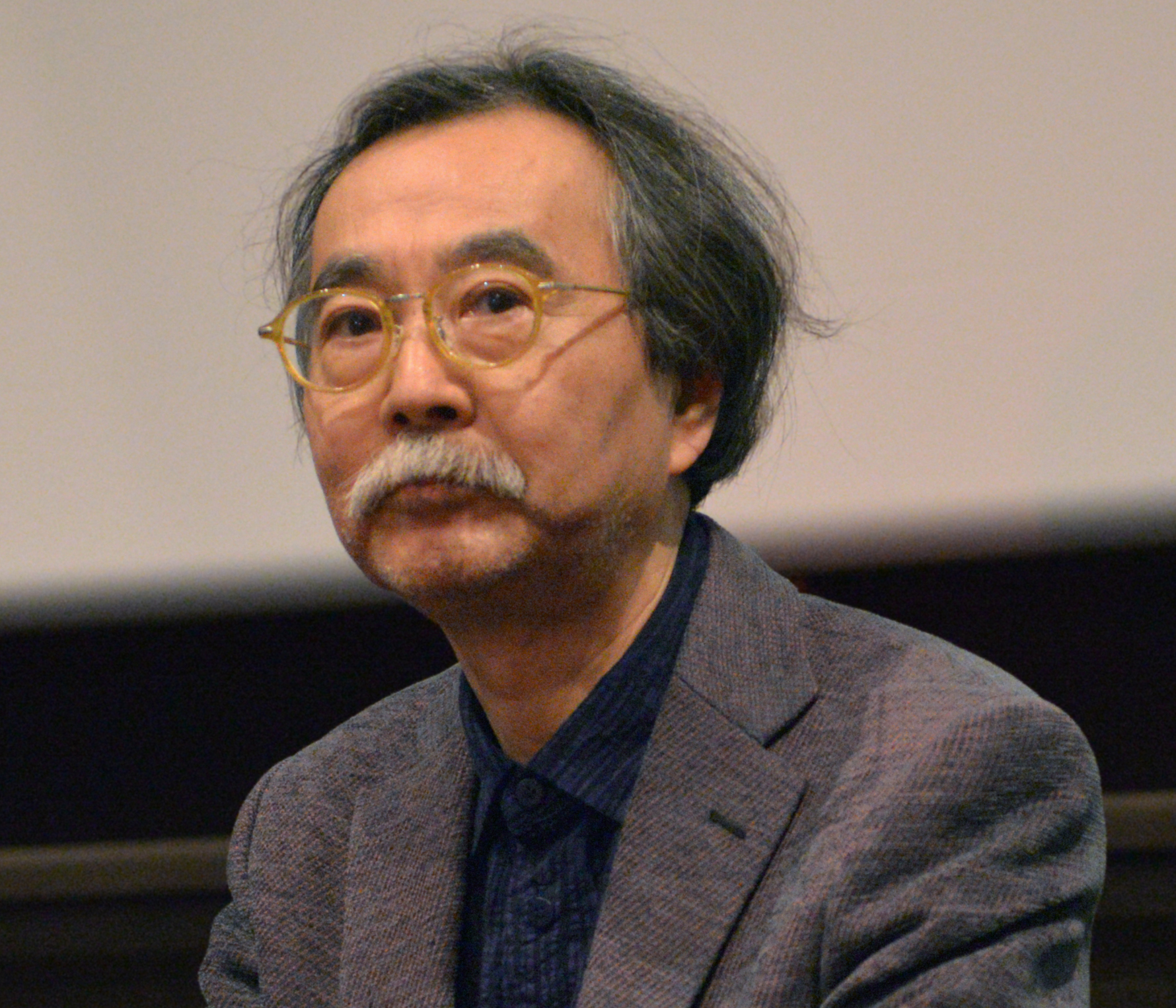 Jiro Taniguchi au Festival International de la BD d'Angoulême 2015.